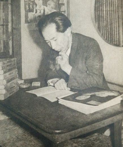 除村吉太郎